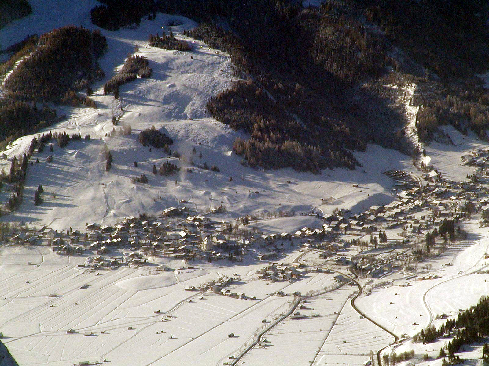 Lermoos im Schnee